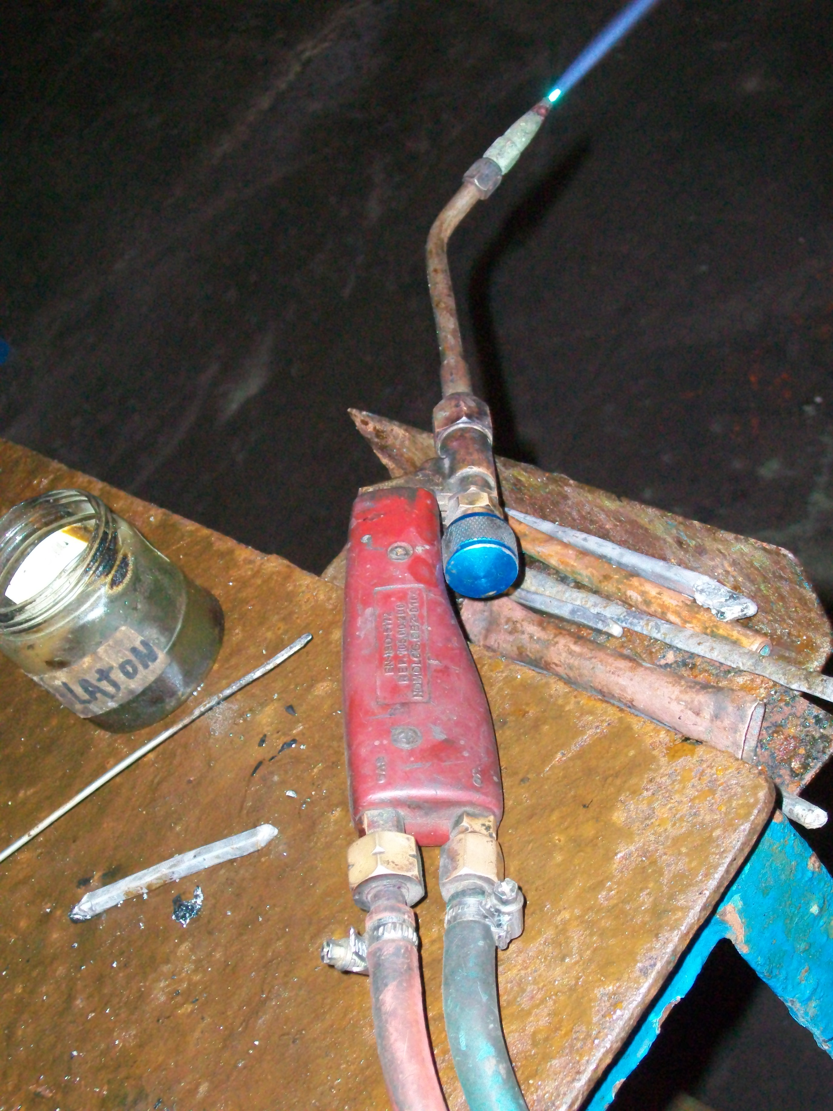 Soplete para la mezcla de oxigeo y acetileno